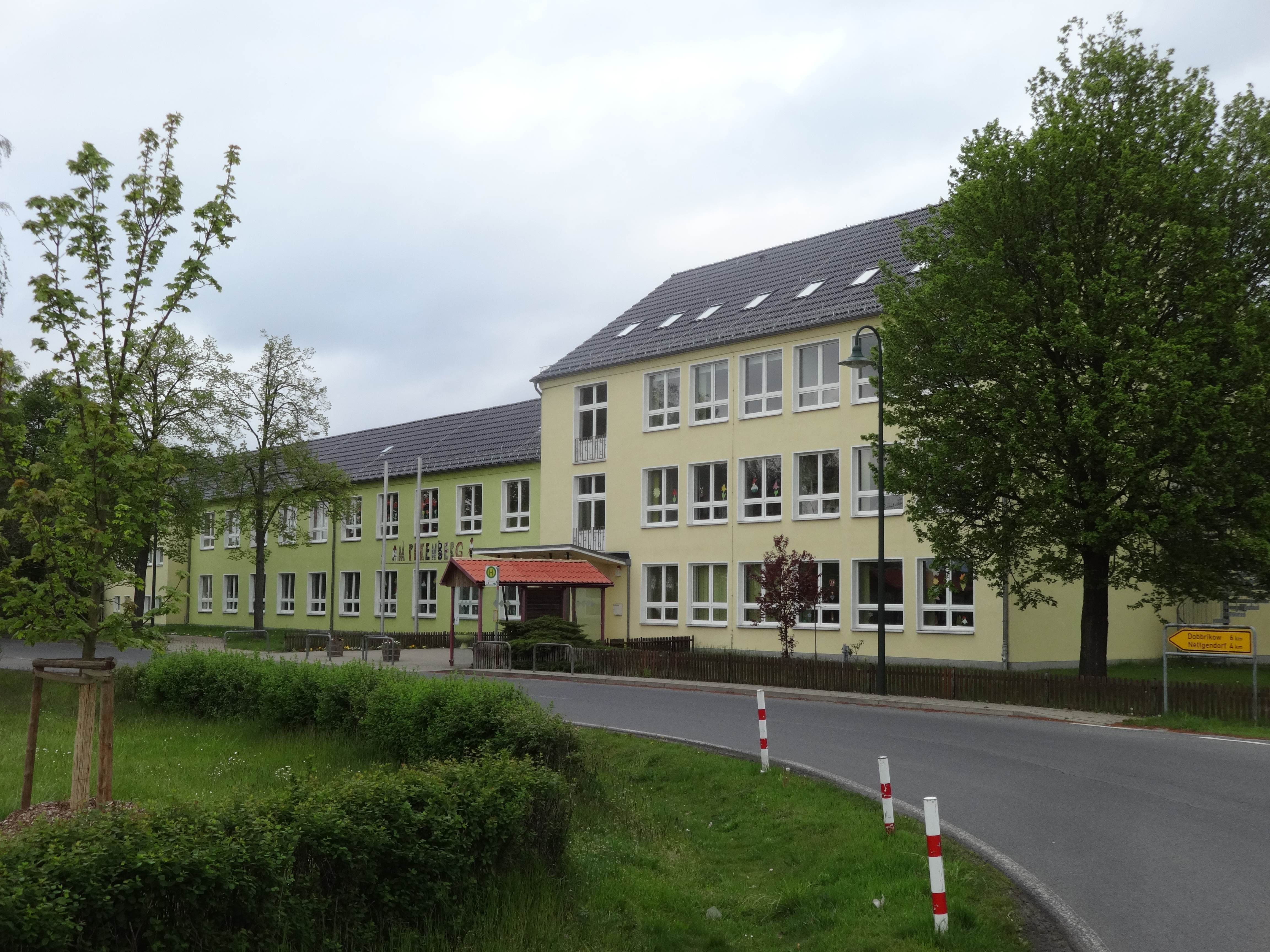 Grundschule am Pekenberg in Zülichendorf, Gemeinde Nuthe-Urstromtal in Brandenburg